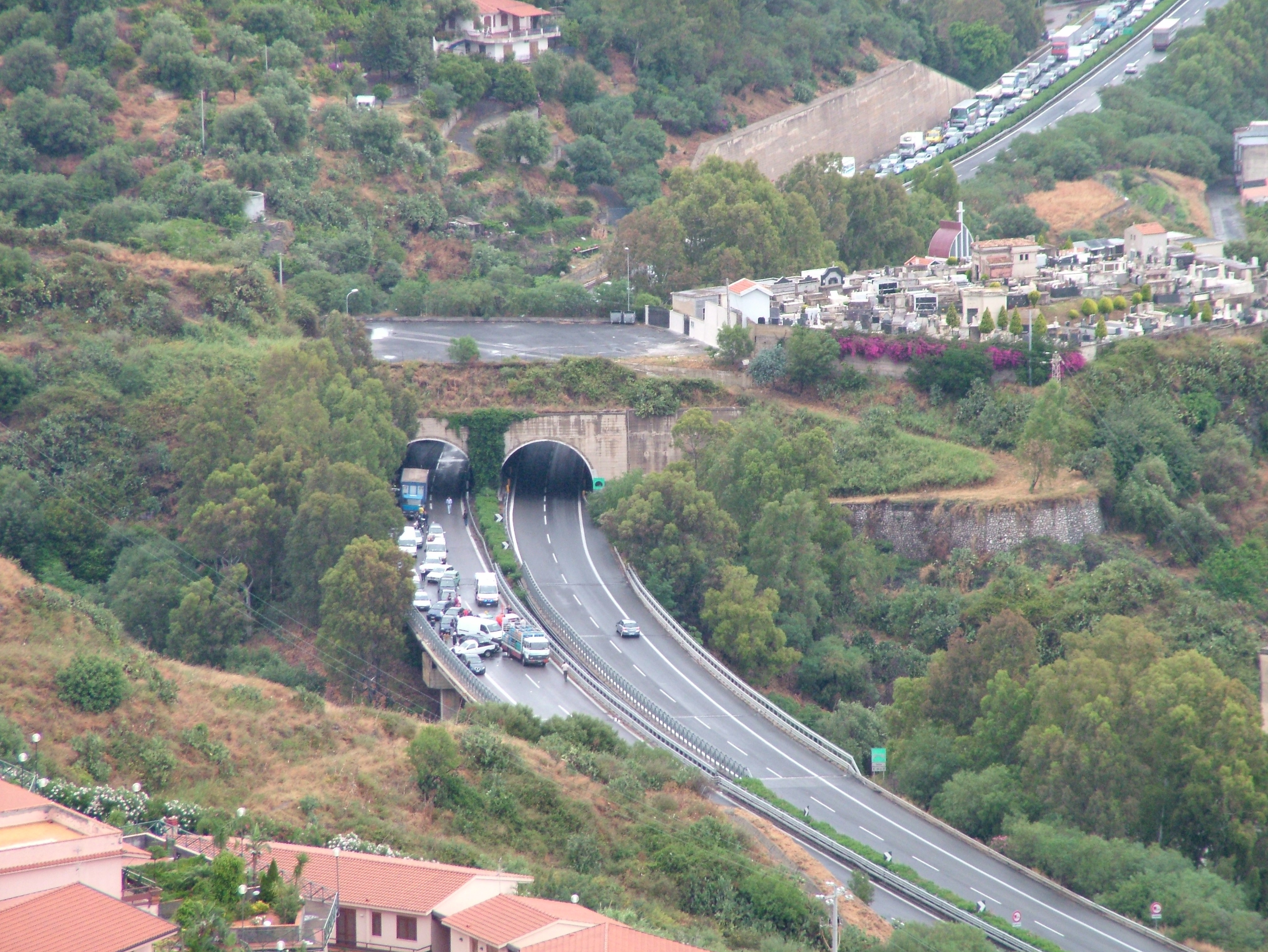 A18 (Italien), Sizilien, Autobahn A18 bei Sant'Alessio Siculo, Provinz Messina, ein Unfall